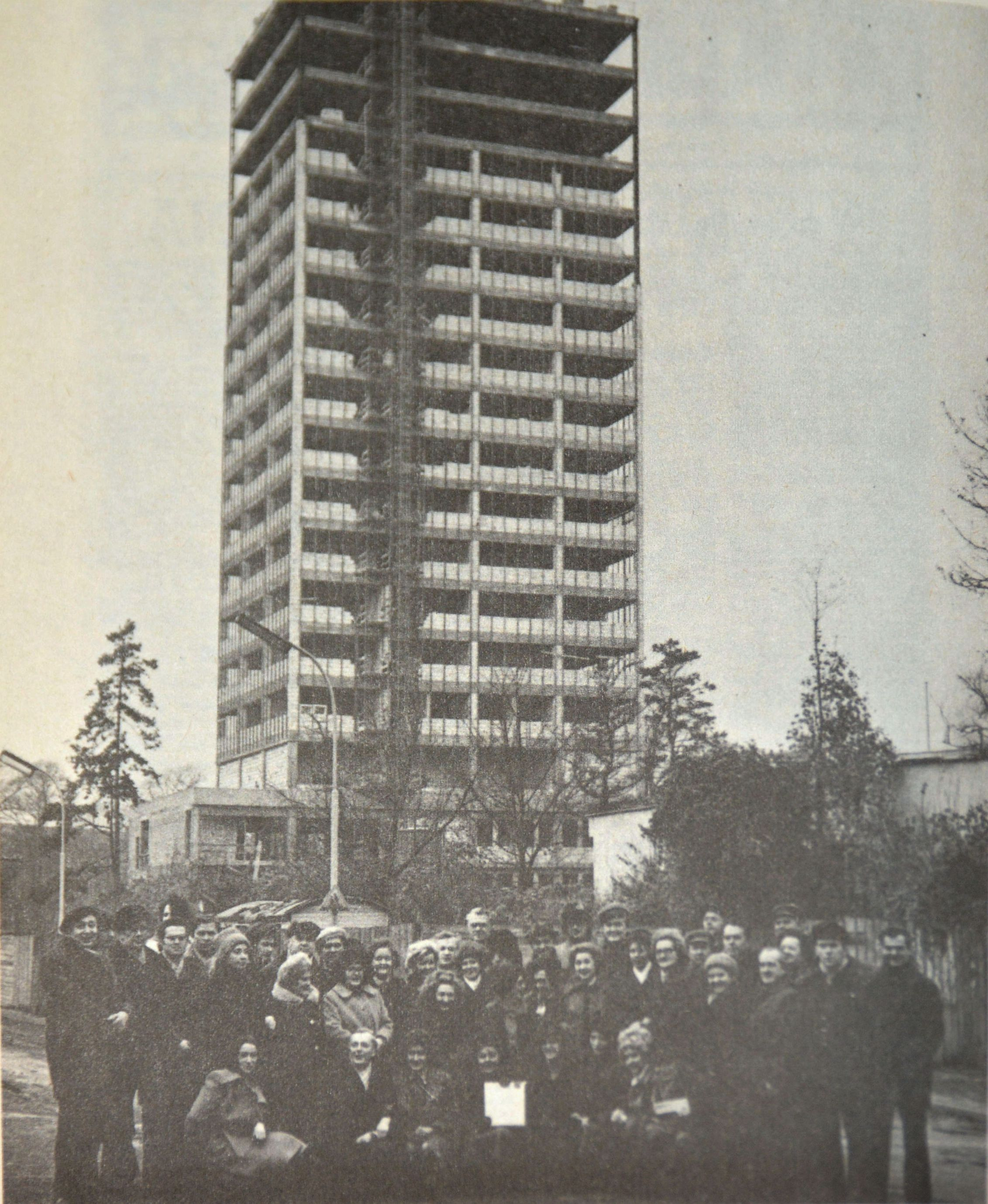 Ekipa Szczecińskiej Rozgłośni Polskiego Radia na tle budującego się wieżowca PRiTV w Szczecinie